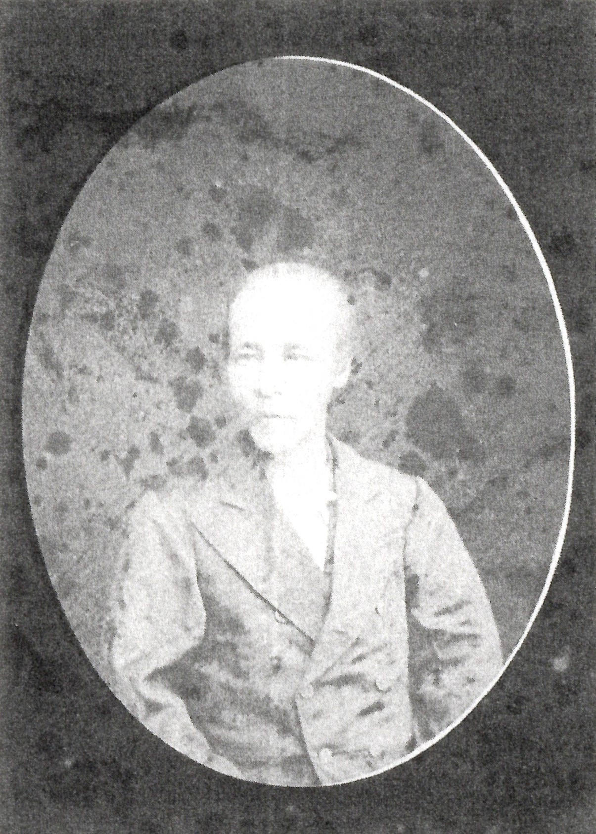 松平直巳の肖像写真。